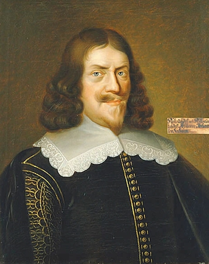 Johan Adler-Salvius, 1590-1652